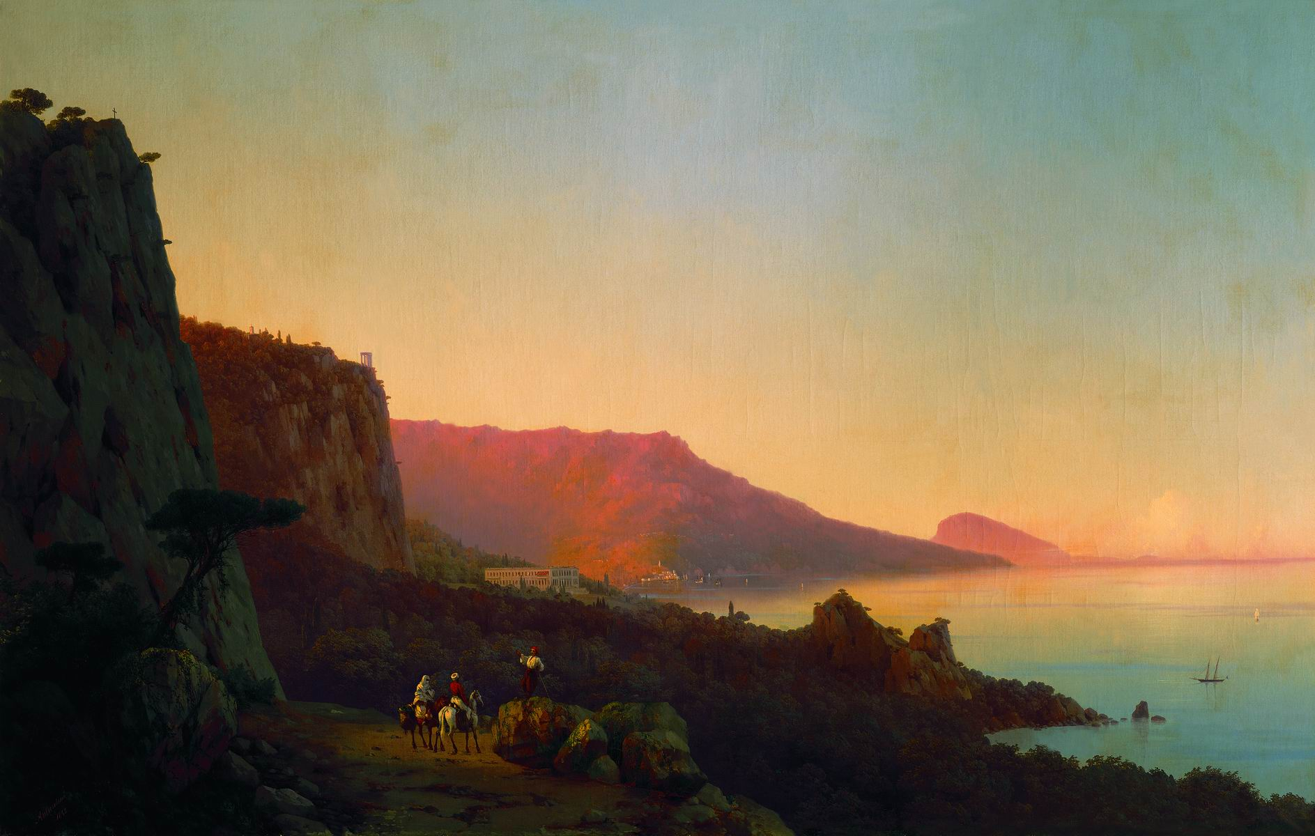 Вечер в Крыму. Ялта. 1848 Холст,масло. 126х196см. Феодосийская картинная галерея им. И.К.Айвазовского, Феодосия